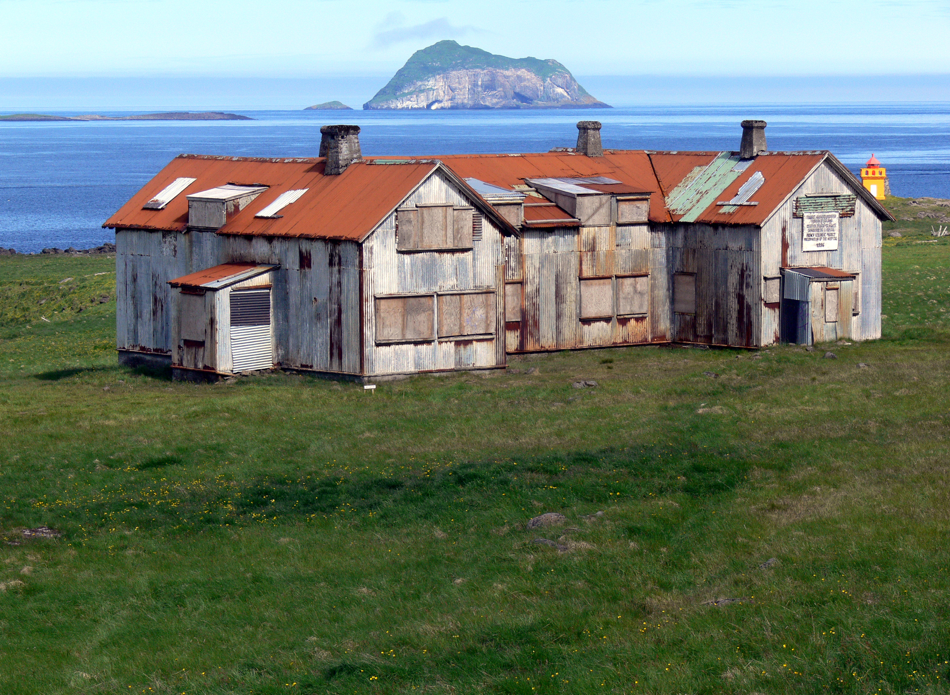 Ehemaliges französisches Hospital in Fáskrúðsfjörður.